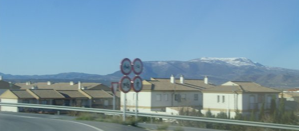 Casas junto a la salida de la autovía A-92, en la localidad de Cijuela (Granada, España). La Sierra de Parapanda al fondo. Recorte de una foto hecha por mí.